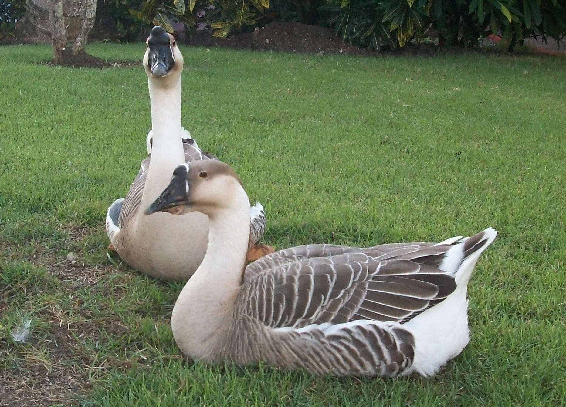 Pato del Natura Park